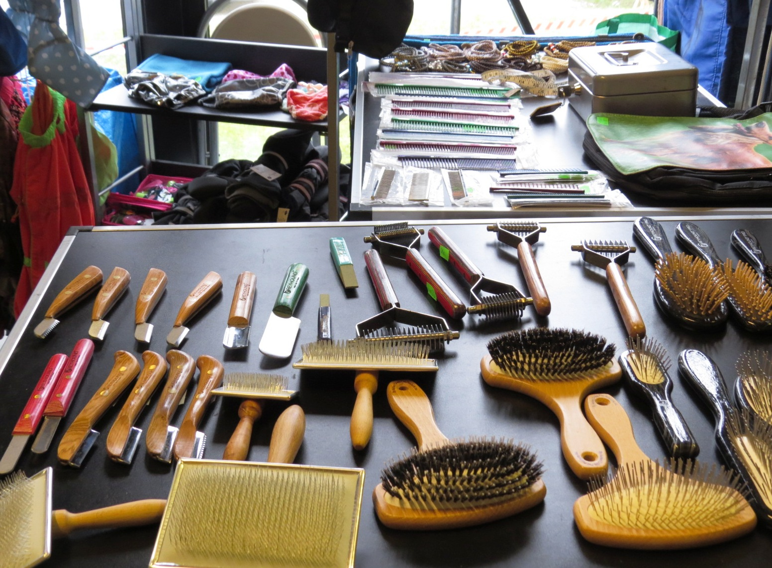 Инструменты для ухода за шерстью